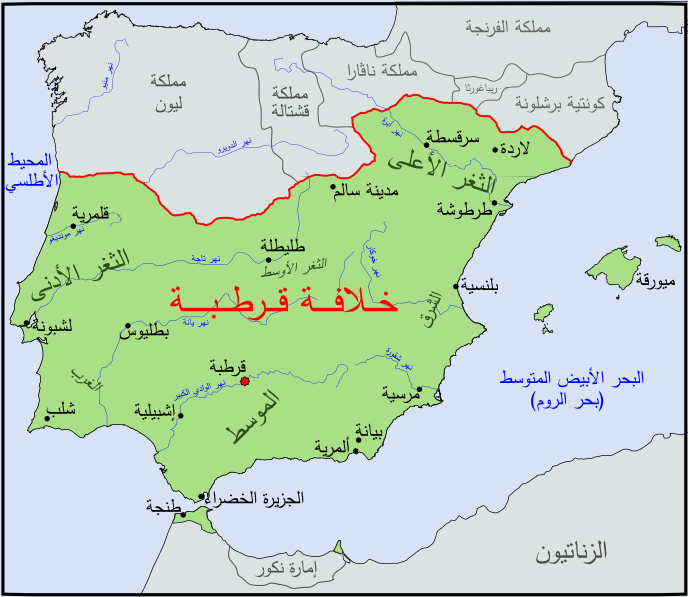 خِلافة قُرطُبة حوالي سنة 1000م.